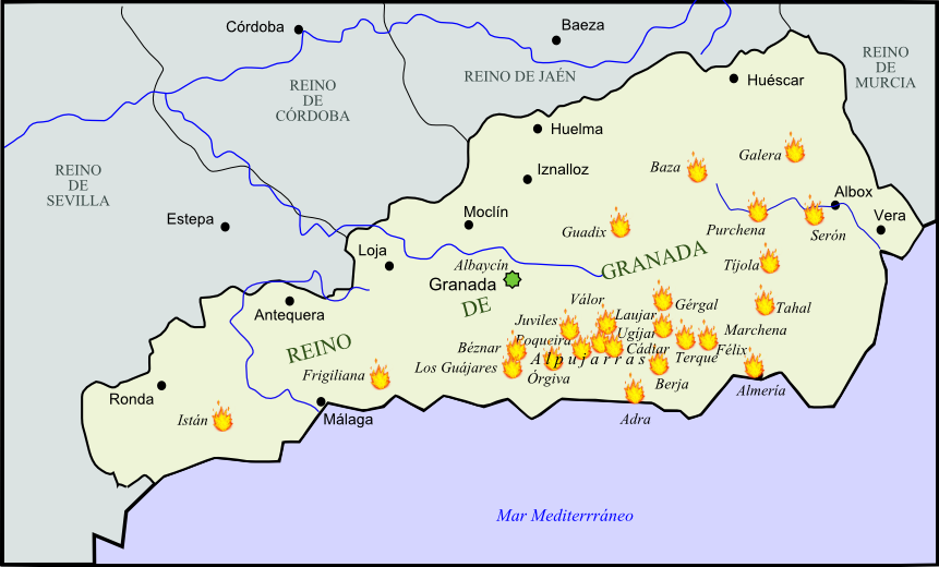 Rebelión morisca de Las Alpujarras (1568-1571)